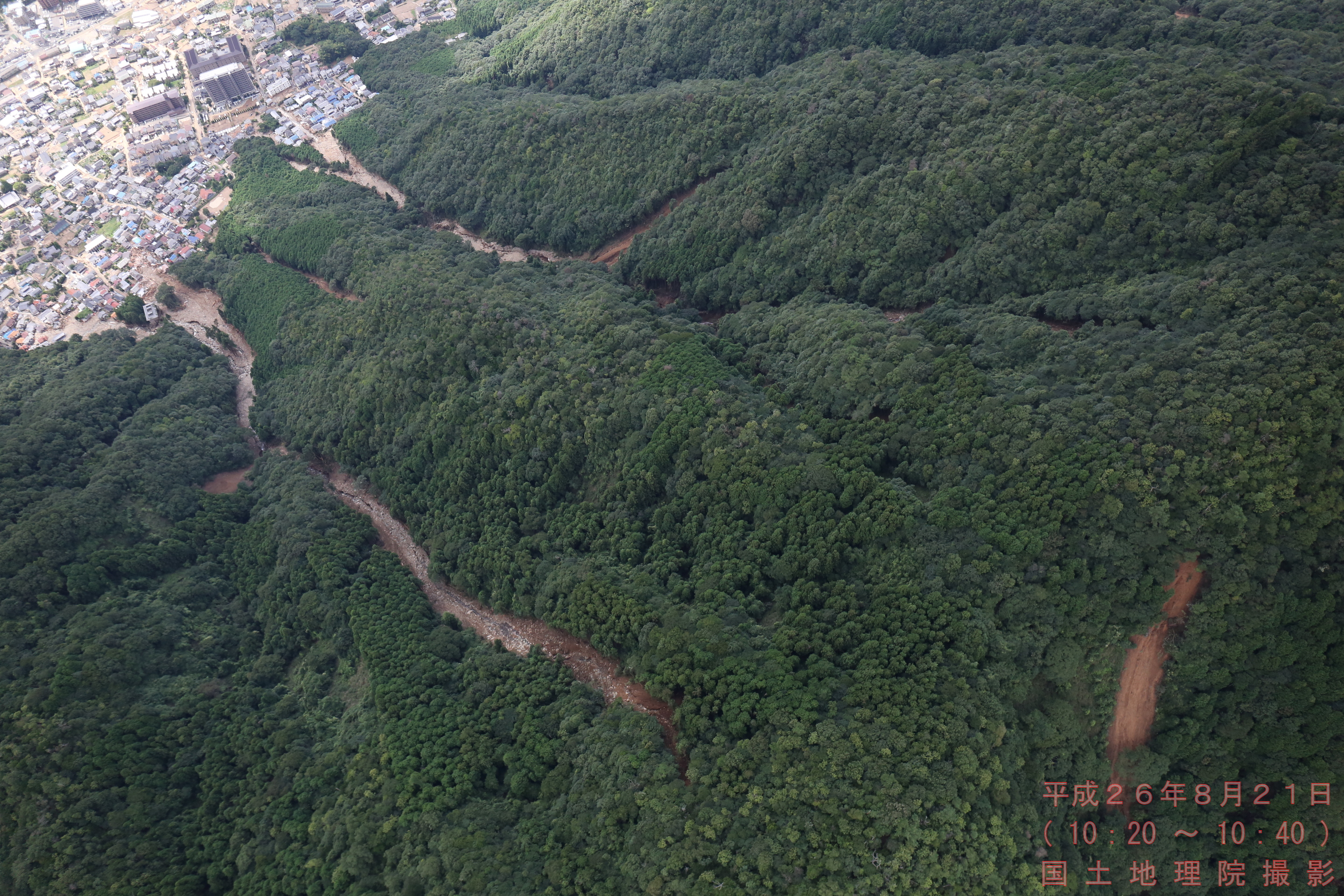 平成26年8月豪雨による広島市の土砂災害